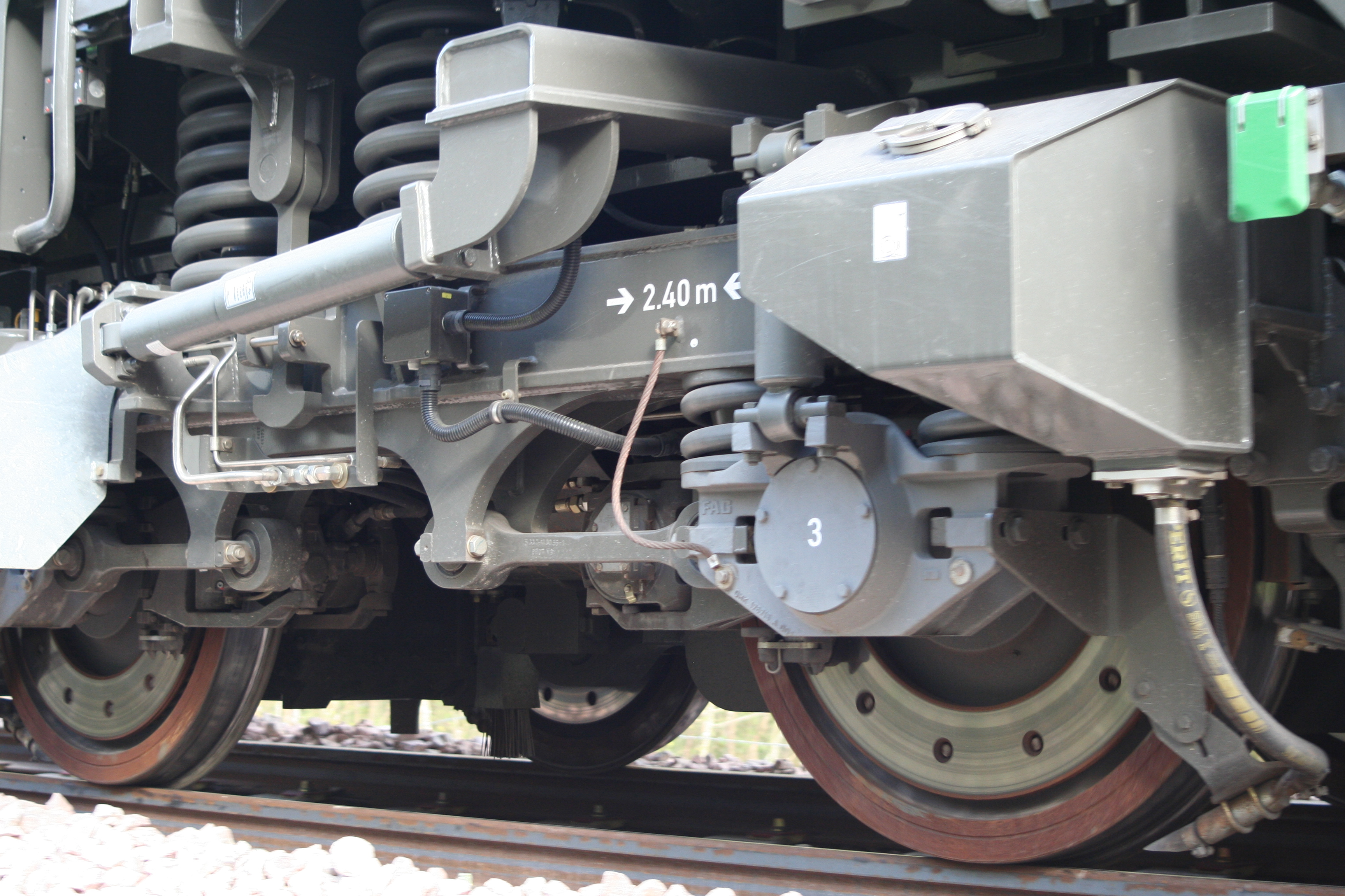 Photo d'un boggie d'une G 2000 BB du constructeur Vossloh. On y distingue plus particulièrement les disques de freins montés sur les flancs des roues, ainsi que la brosse de captage du système de signalisation "crocodile"